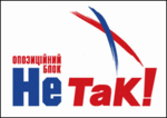 логотип Опозиційного блоку «Не так!»